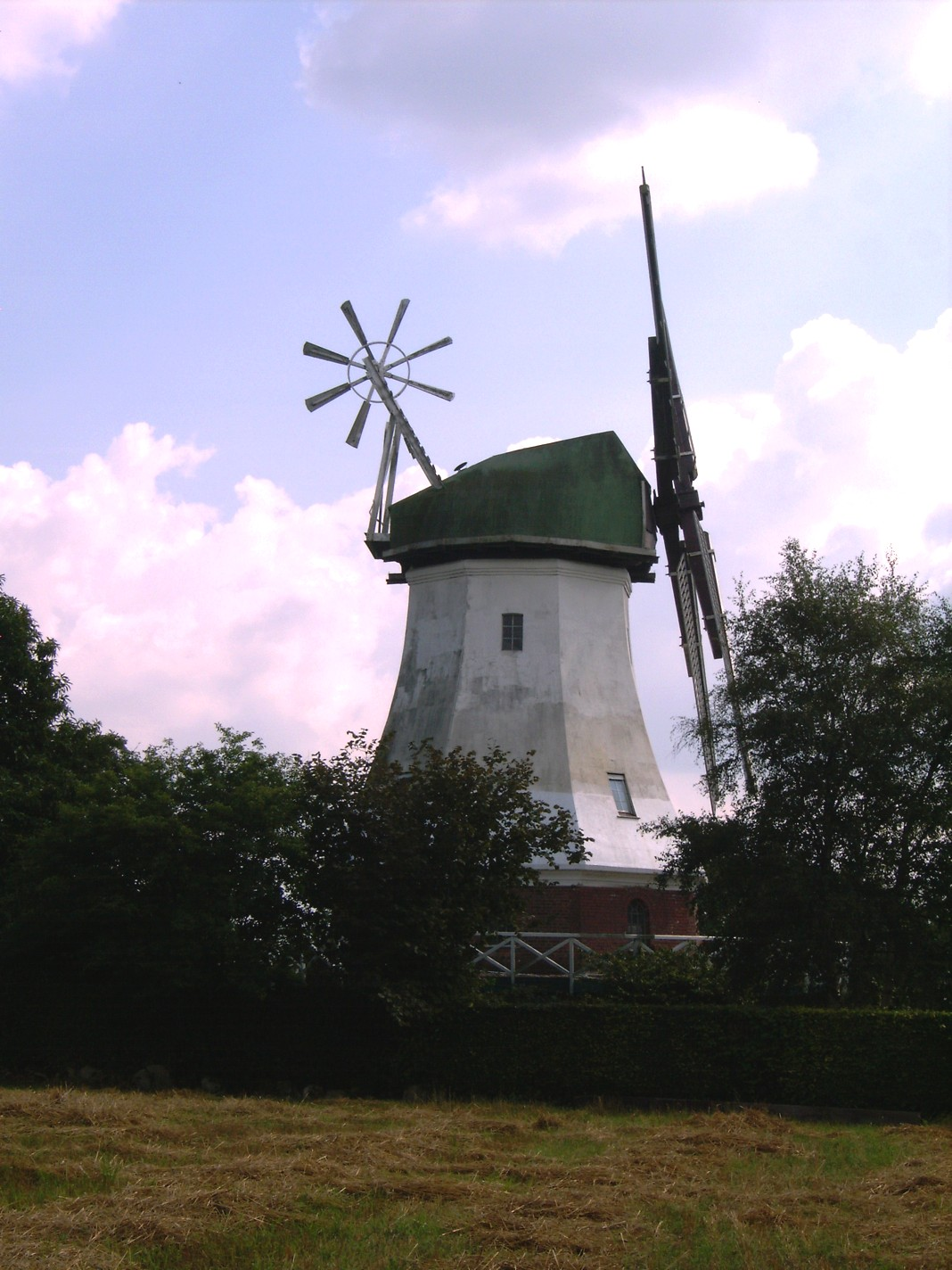 Windmuehle in Wallhöfen, Gemeinde Vollersode